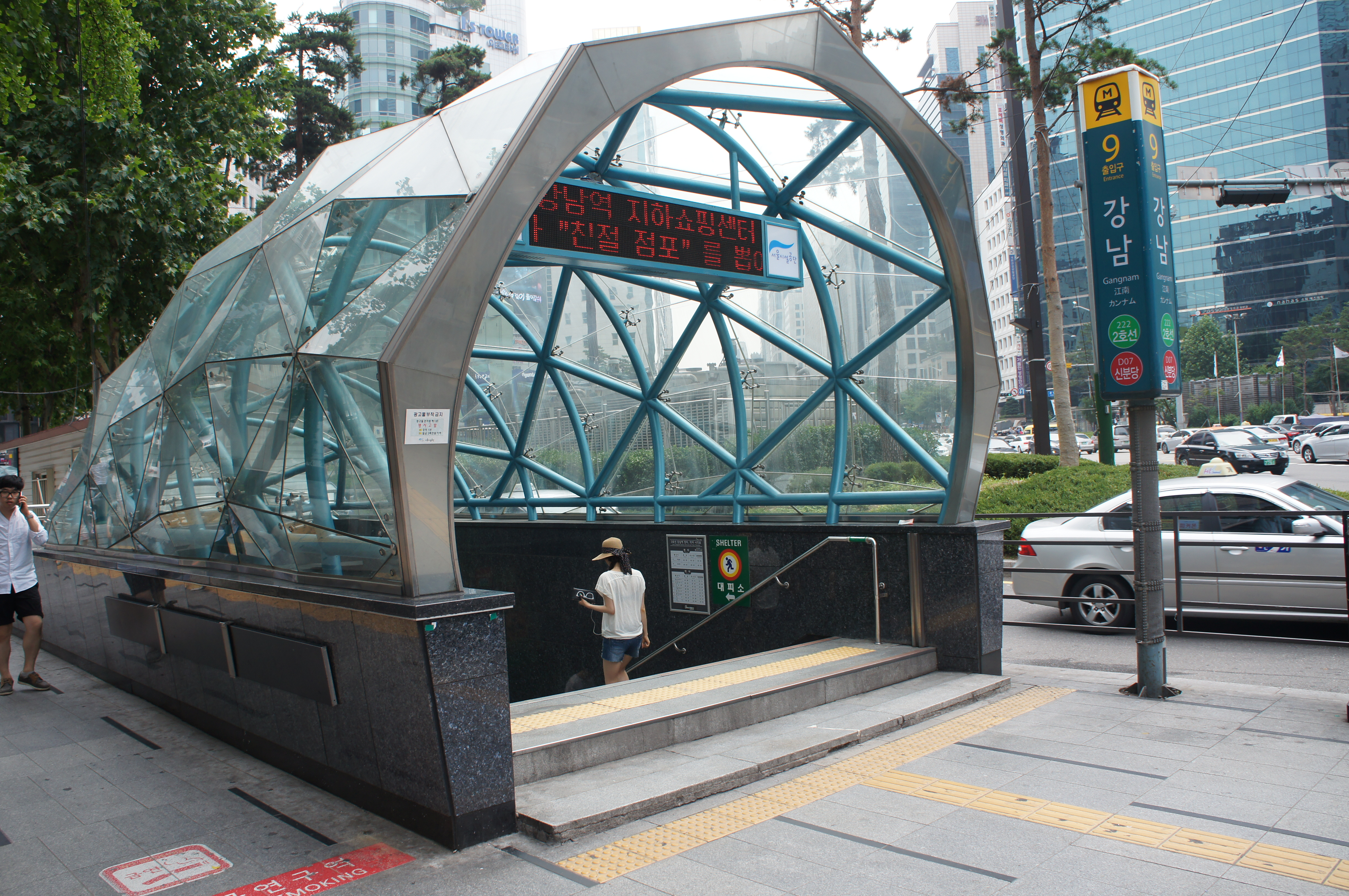 강남역 9번출구